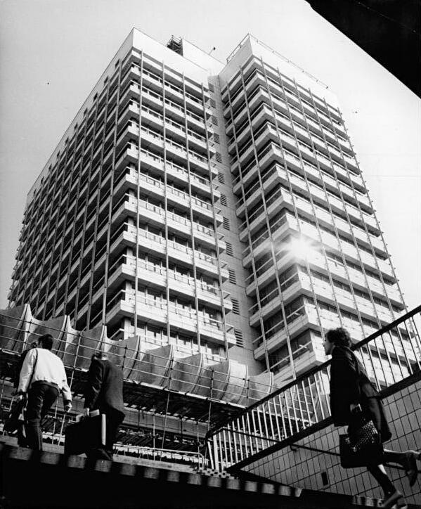 Berlin, Alexanderplatz, "Haus des Reisens" ADN-ZB Koard 24.9.71 Berlin: Moderne Architektur im Berliner Stadtzentrum - unser Foto zeigt das Haus des Reisens am Alexander-Platz.